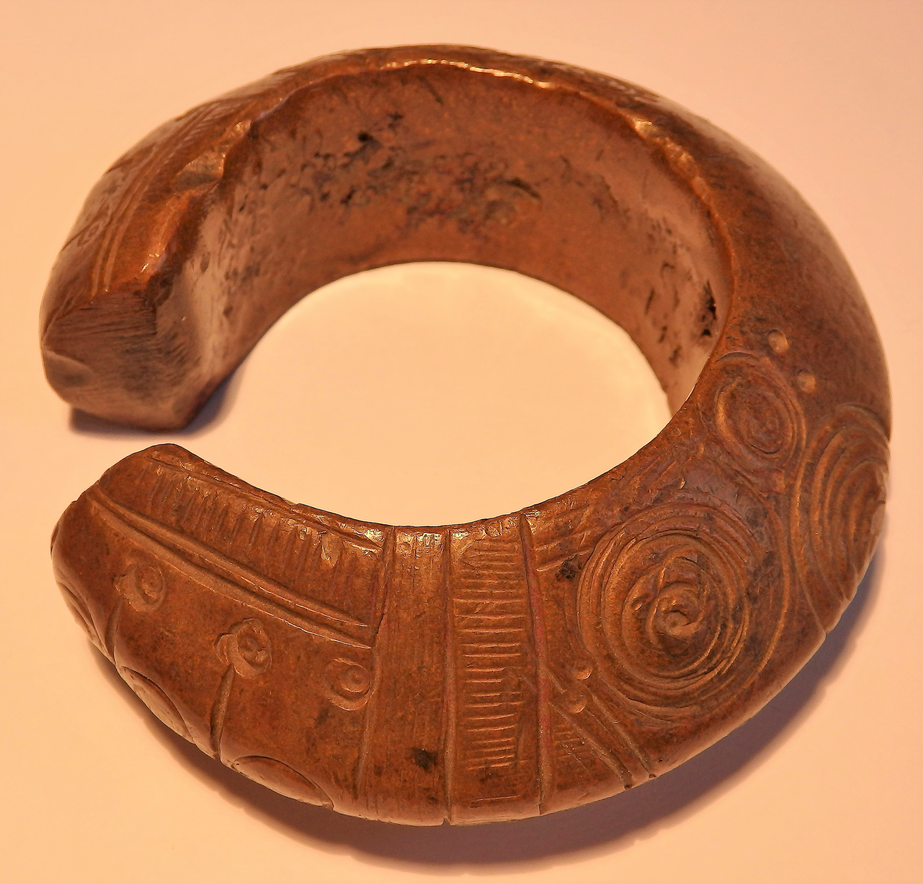 Kupferarmreif-Manilla, Nigeria, 19. Jh., 710 Gramm schwer